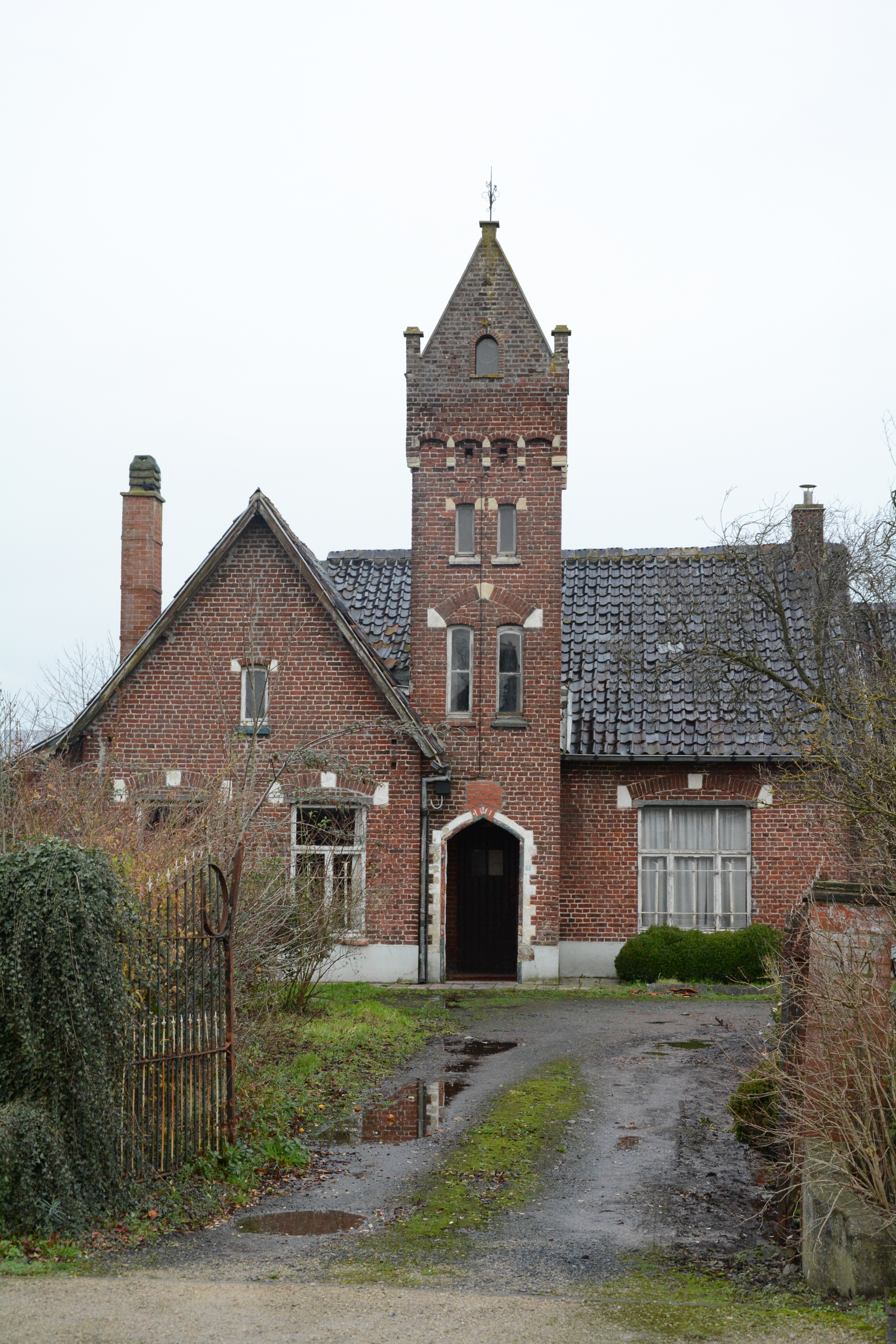 Zogenaamde Pachthoeve Lagrou, Steenveldstraat 1, Torhout